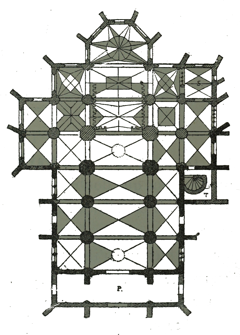 par un dessin de Fichot.